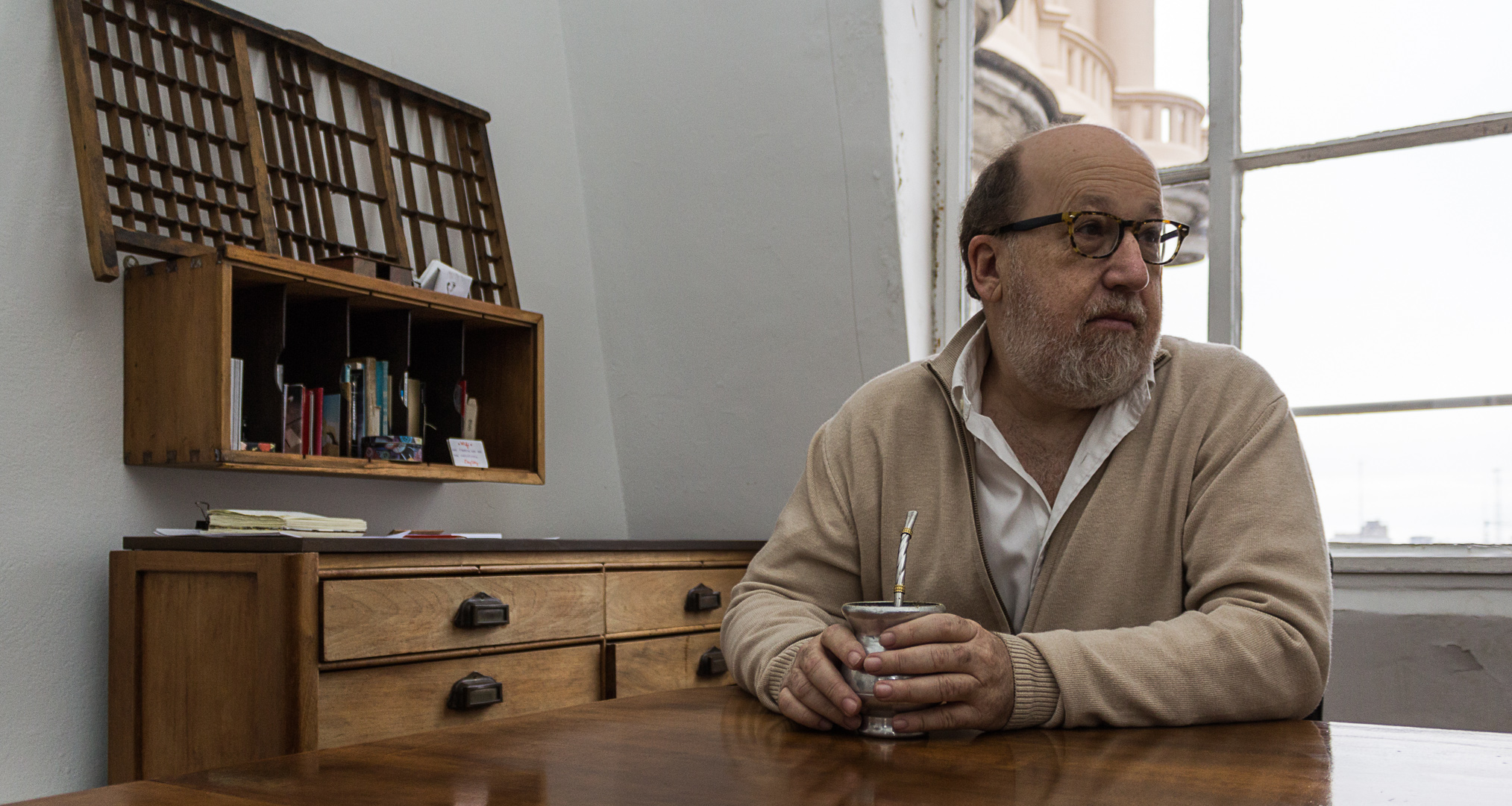 Eduardo Epszteyn. Auditor General Ciudad de Buenos Aires